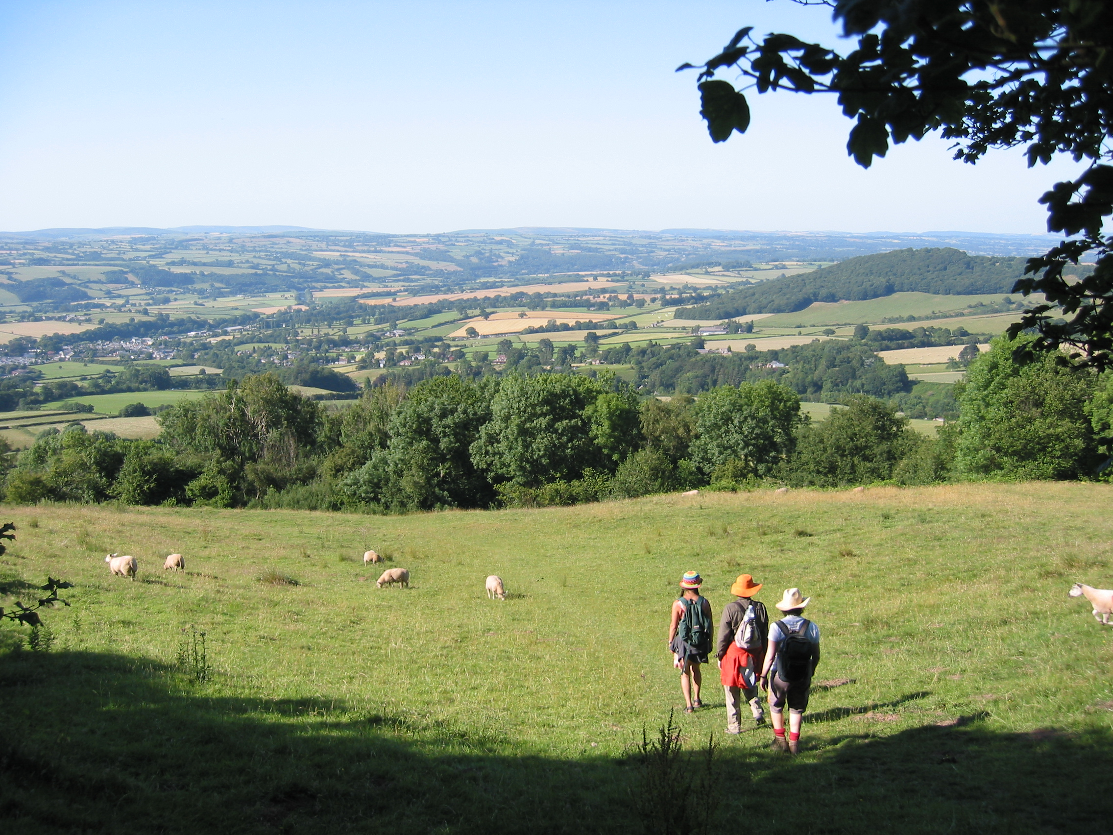 Offa's Dyke Path: Abstieg vom Hay Bluff nach Hay on Wye